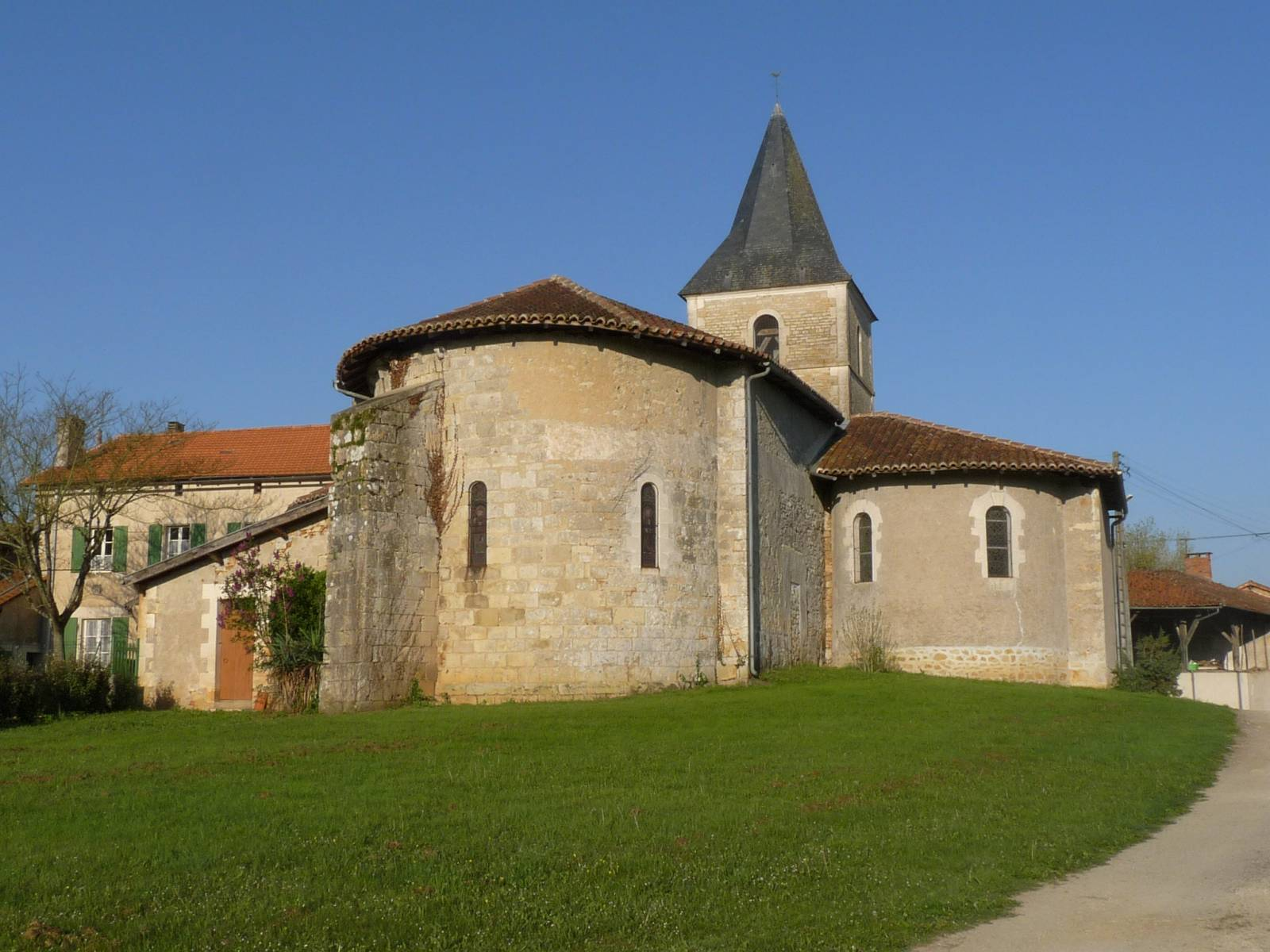 Eglise de Nieuil, Charente, France